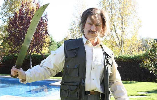 El actor y cómico Joaquín Reyes, caracterizado como Miguel de la Quadra-Salcedo para el programa Muchachada Nui.